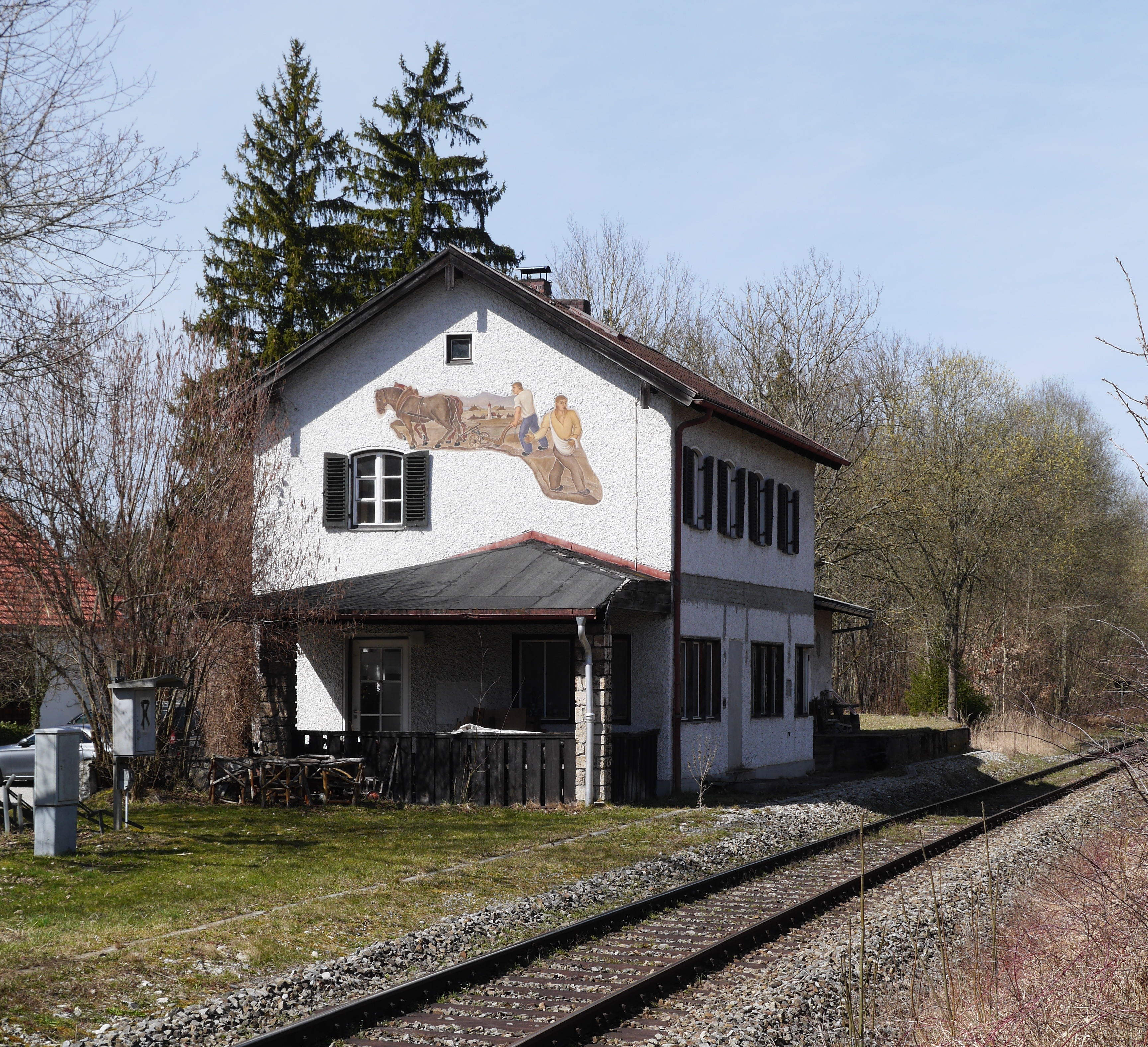 Empfangsgebäude des stillgelegten Bahnhofs Greifenberg von der Gleisseite